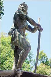 monumento